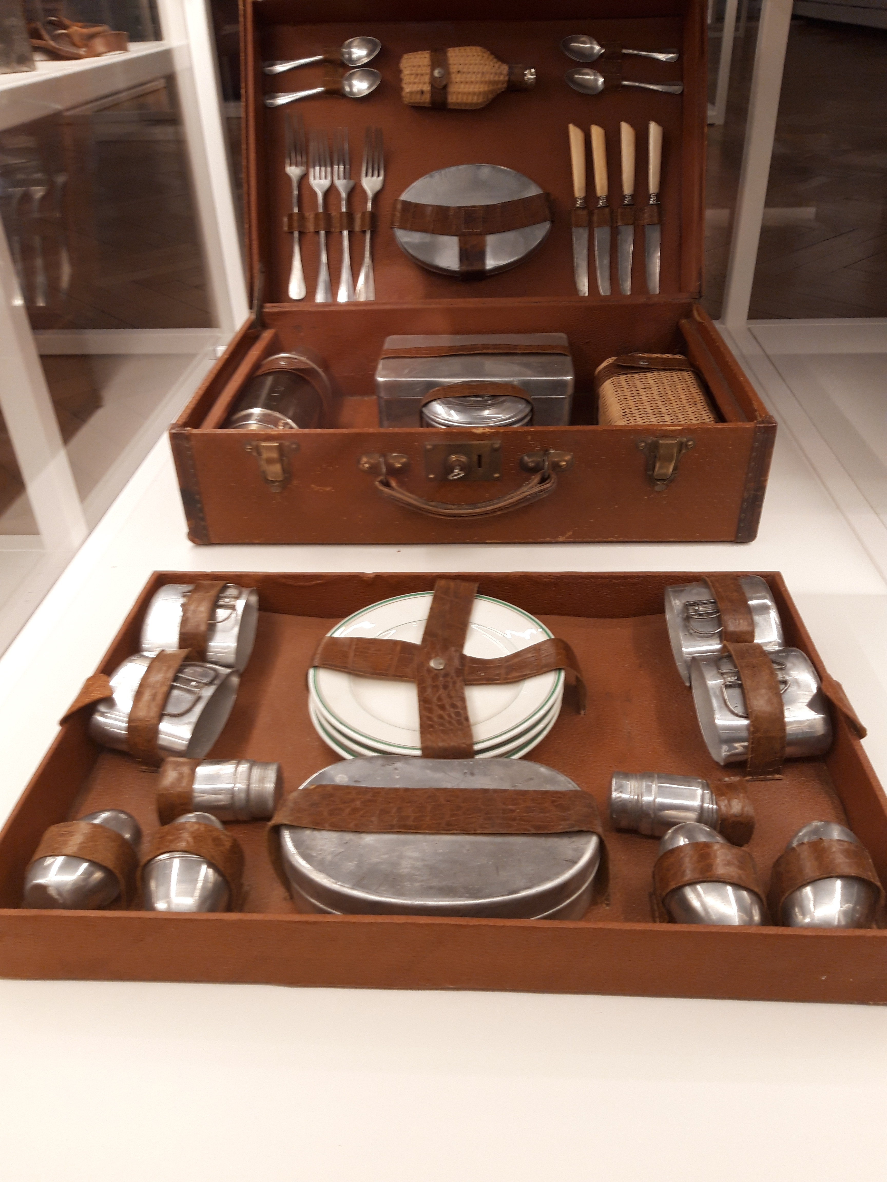 Nécessaire à pique-nique de luxe, date inconnue, Musée du bagage, Haguenau